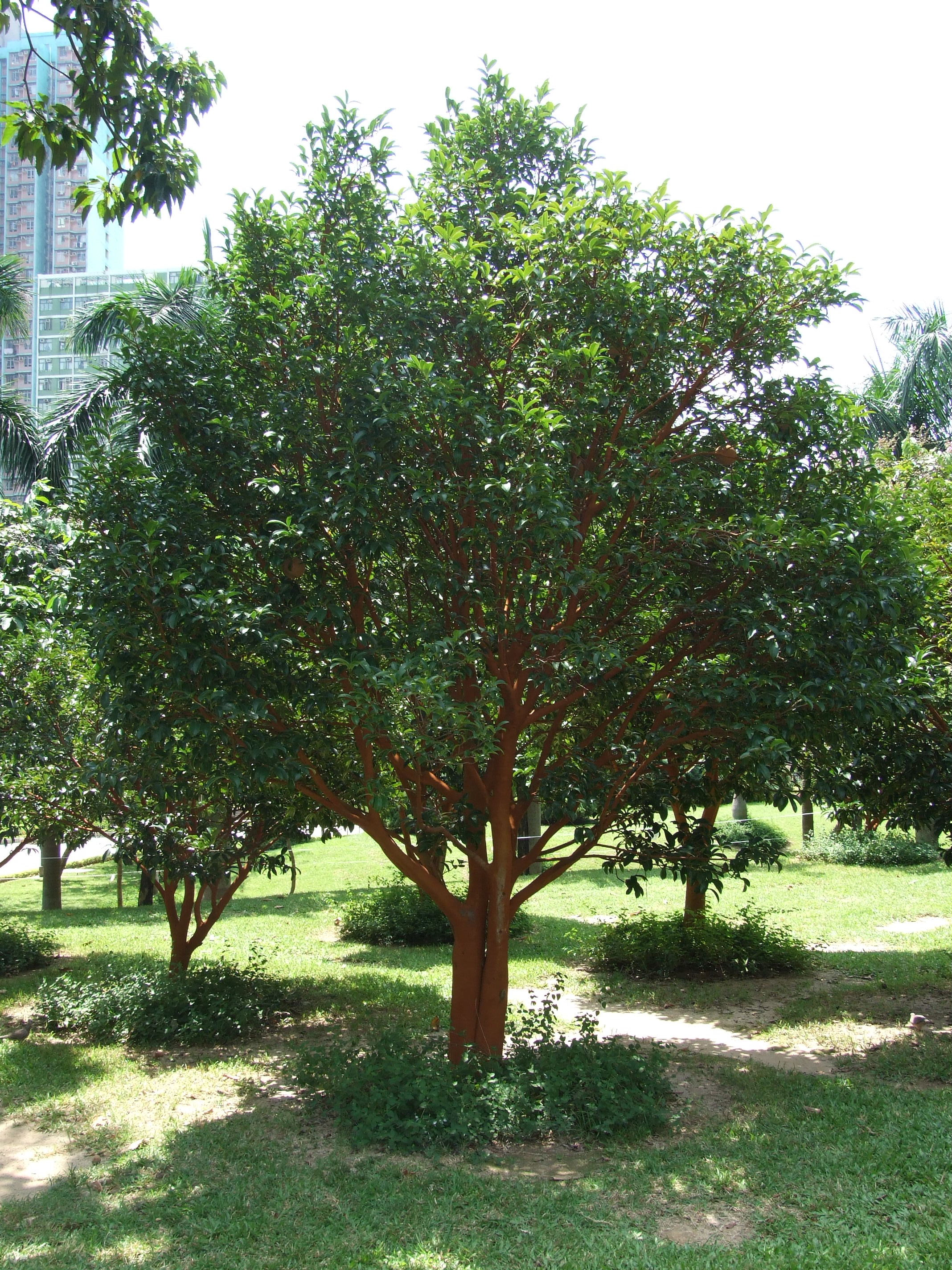 中文（香港）: 紅皮糙果茶